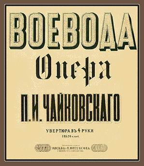 Плакат оперы "Воевода"